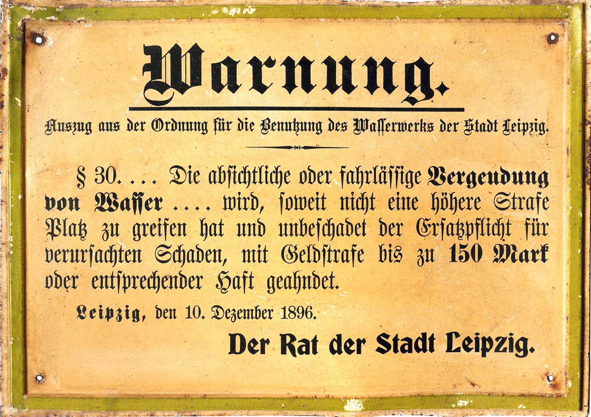 Warnschild des Wasserwerks der Stadt Leipzig, angebracht meist in Hausfluren, Blech, 18 × 25,5 cm